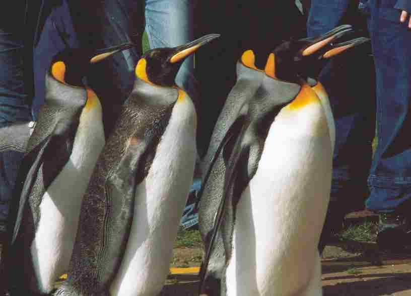 Königspinguine (Aptenodytes patagonicus) im Zoo Edinburgh